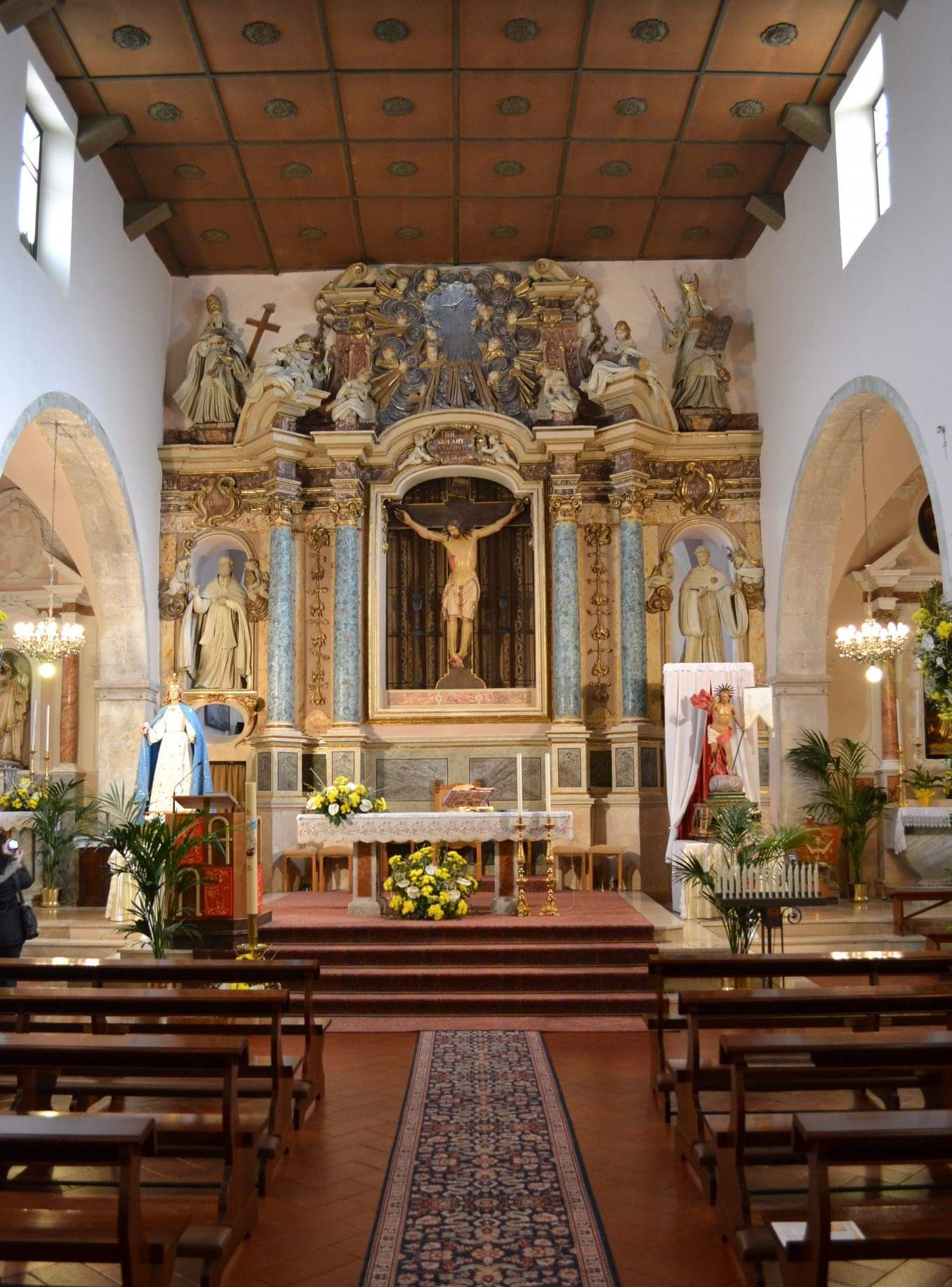 Interni chiesa madre Introdacqua